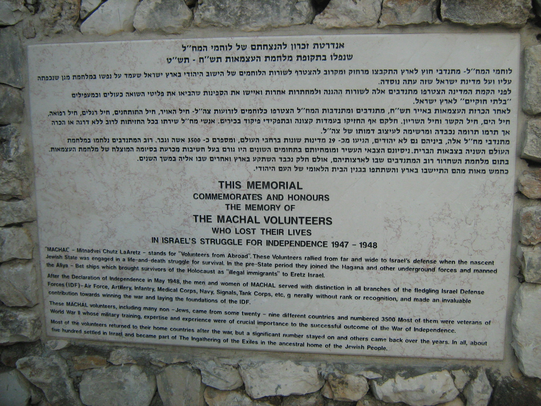 אנדרטת המח"ל